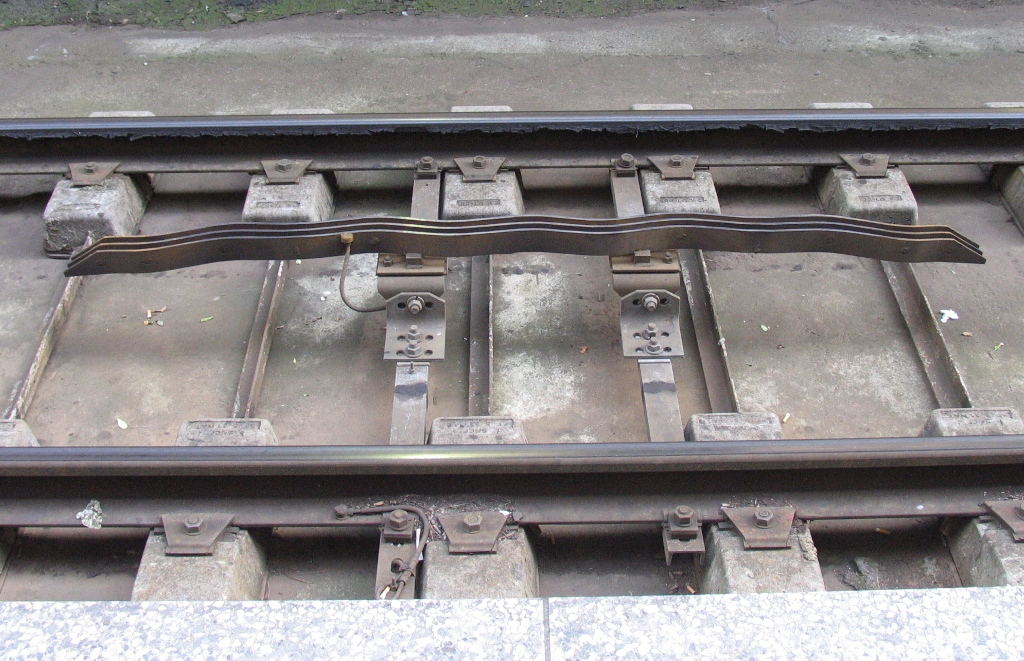 Crocodile court - Gare de Paris-Montparnasse.